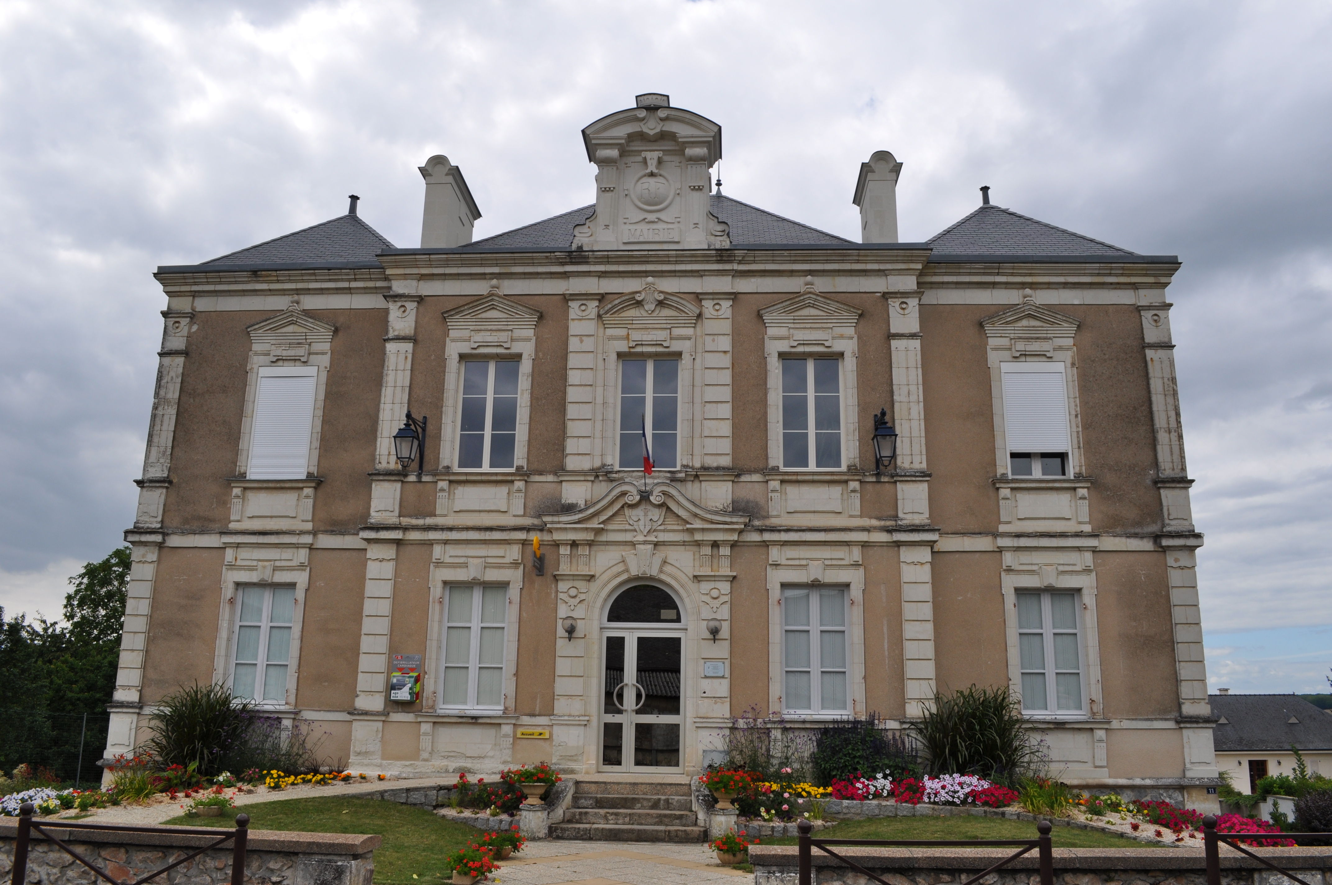 Mairie de la Fontaine-Guérin (Maine-et-Loire)